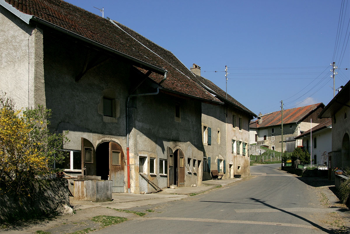 Bauernhäuser in Bretonnières